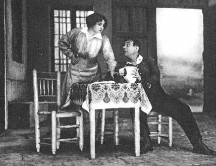 María Guerrero en una escena de la obra de teatro del dramaturgo español Jacinto Benavente La malquerida